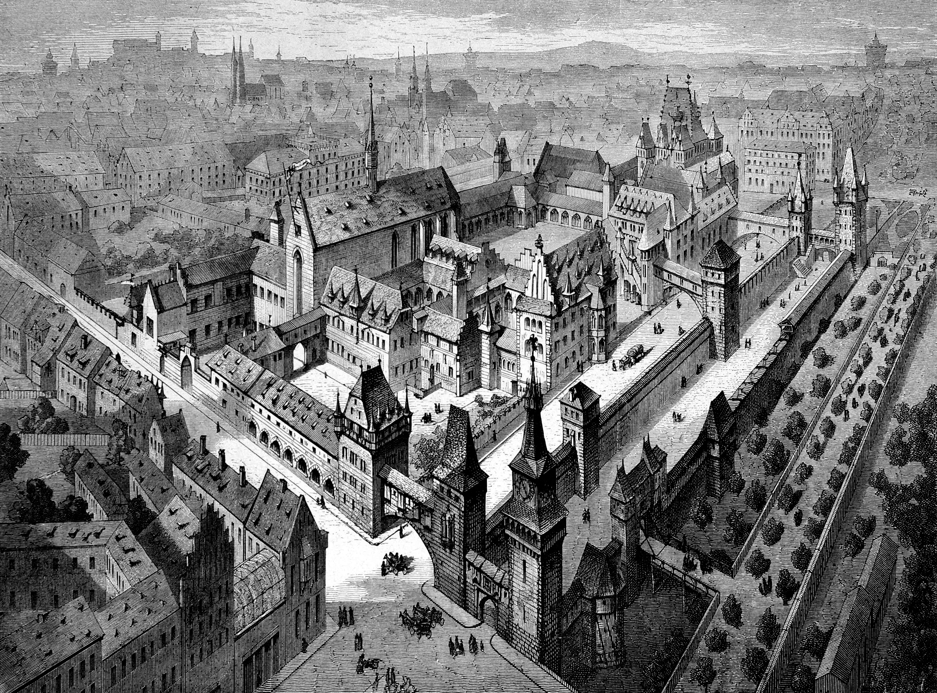 Germanisches Nationalmuseum in Nürnberg; Zeichnung von 1877 mit den historistischen Umbauten